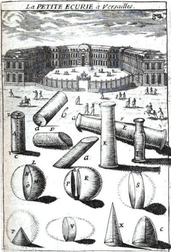 "Des cylindres, hémisphères, colonnes, segmens, ou portions de sphères, cônes, etc." (planche XXXIX).